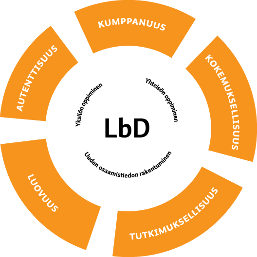 Osaamisen kehittäminen LbD-toimintamallissa (mukaellen Raij 2007)